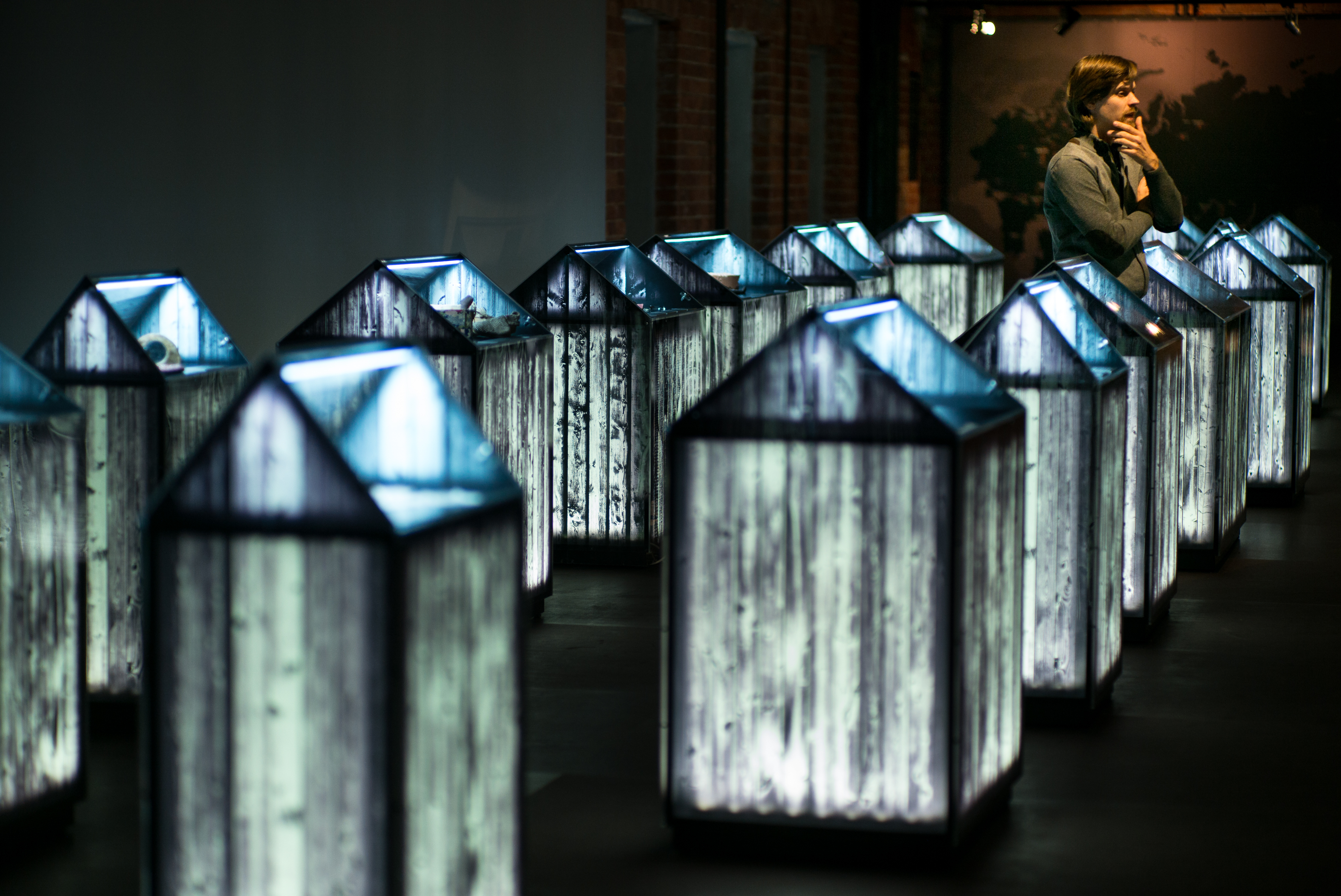 Экспозиция Музея истории ГУЛАГа